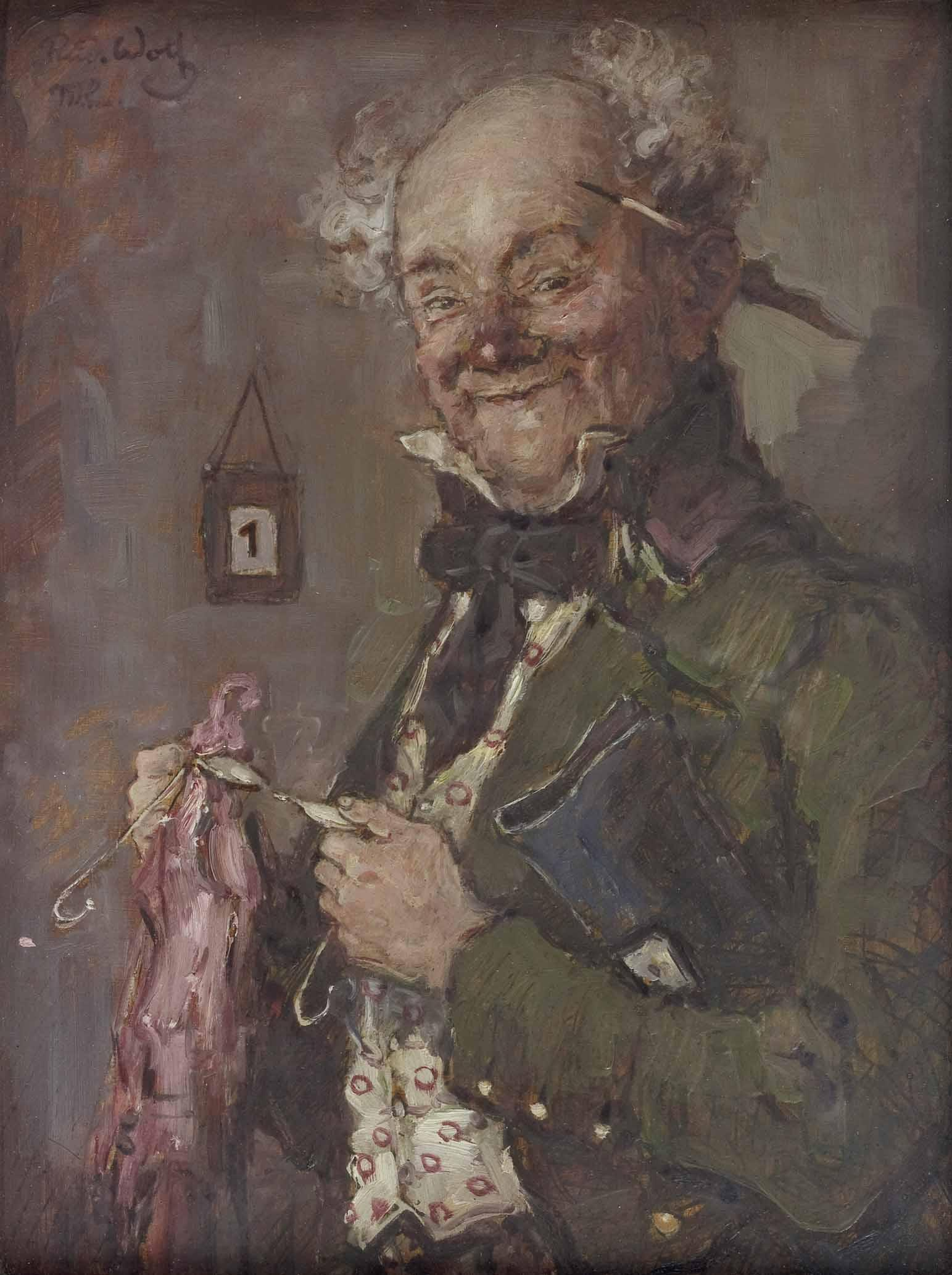 "Der Aktuar" oben links signiert: Rud. Wolf Mchn., Rückseite bezeichnet und betitelt, Öl auf Holzplatte, ca. 32 x 24 cm